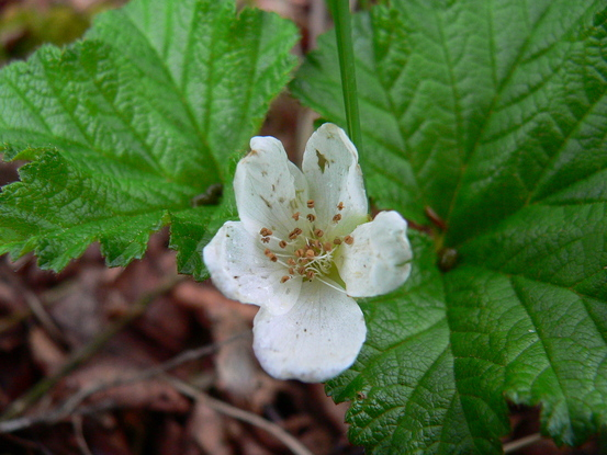 Blüte der Moltebeere (Rubus chamaemorus, männlich) mit Staubfäden; Aufnahme aus dem Plackenmoor (Teil des NSG „Hahnenknooper Moore“) im Landkreis Cuxhaven, Niedersachsen